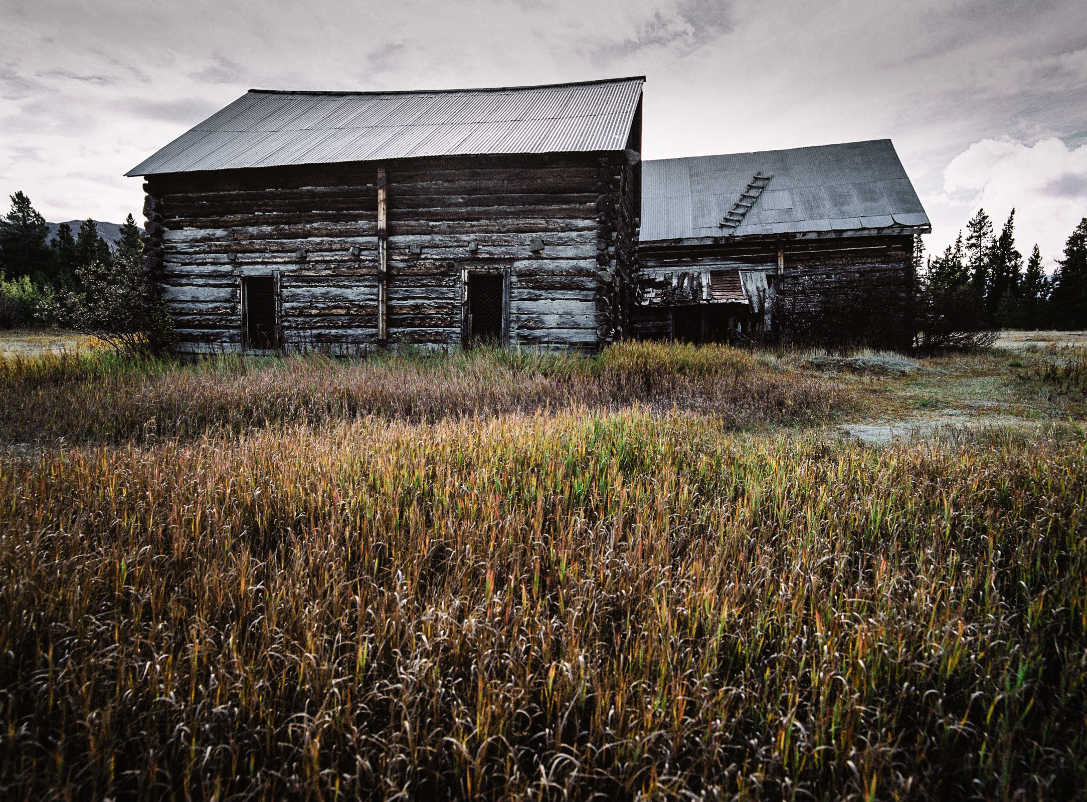 Ektacolor Pro exp. 10/1999